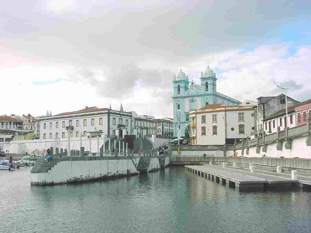 Cais da Alfândega e Marina de Angra do Heroísmo, ilha Terceira, Açores, Portugal.